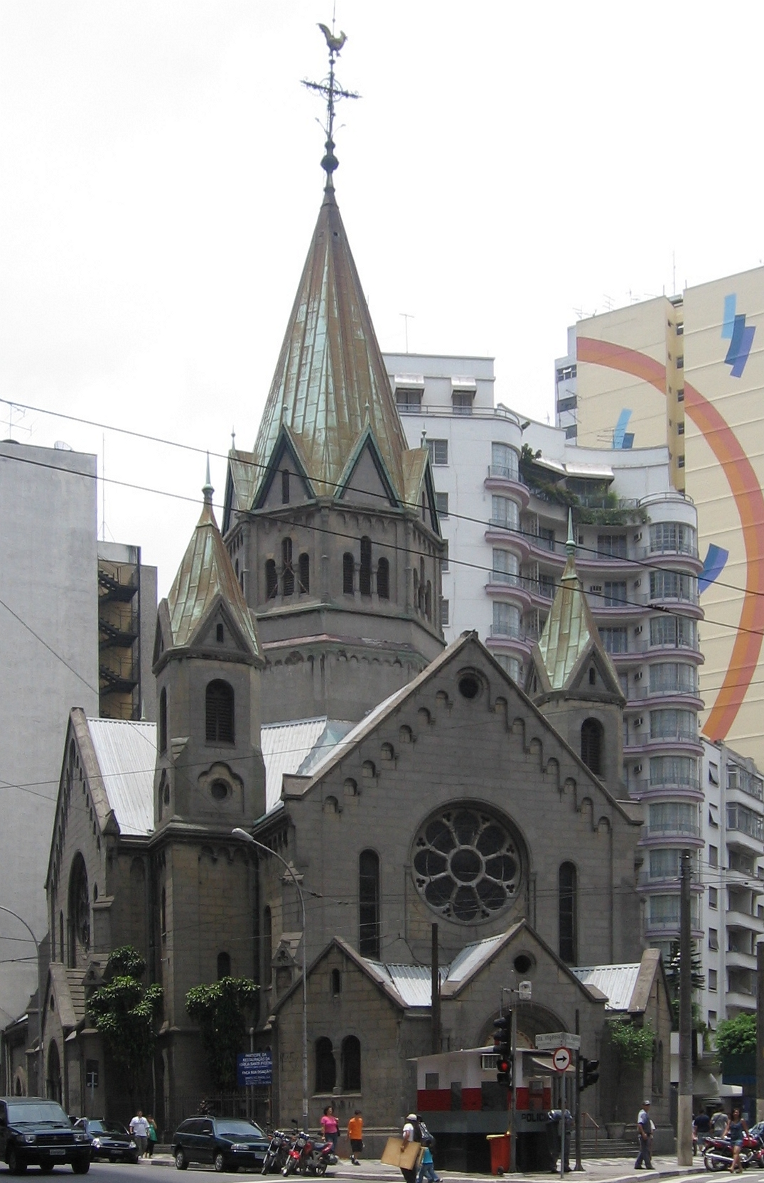 Igreja de Santa Ifigênia, no bairro de mesmo nome, em São Paulo